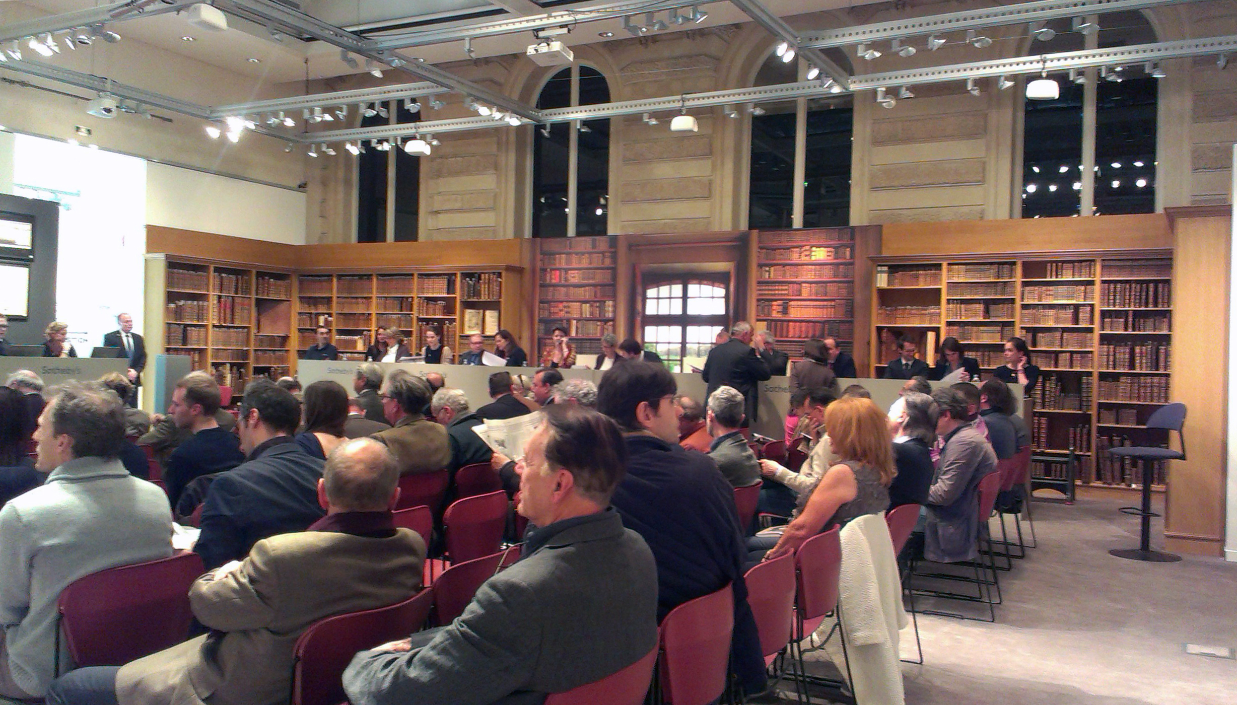 1re vacation de la vente de la bibliothèque du château de Dampierre, appartenant aux ducs de Luynes